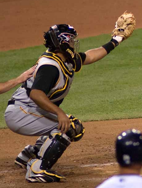 Ronny Paulino